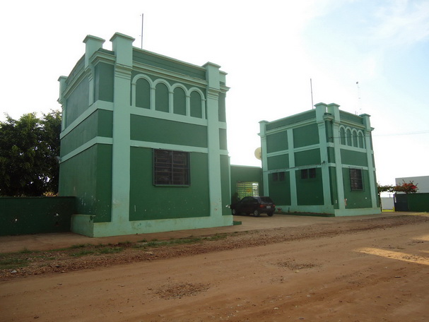 Imagem do distrito de Vitoriana município de Botucatu, estado de São Paulo, Brasil.